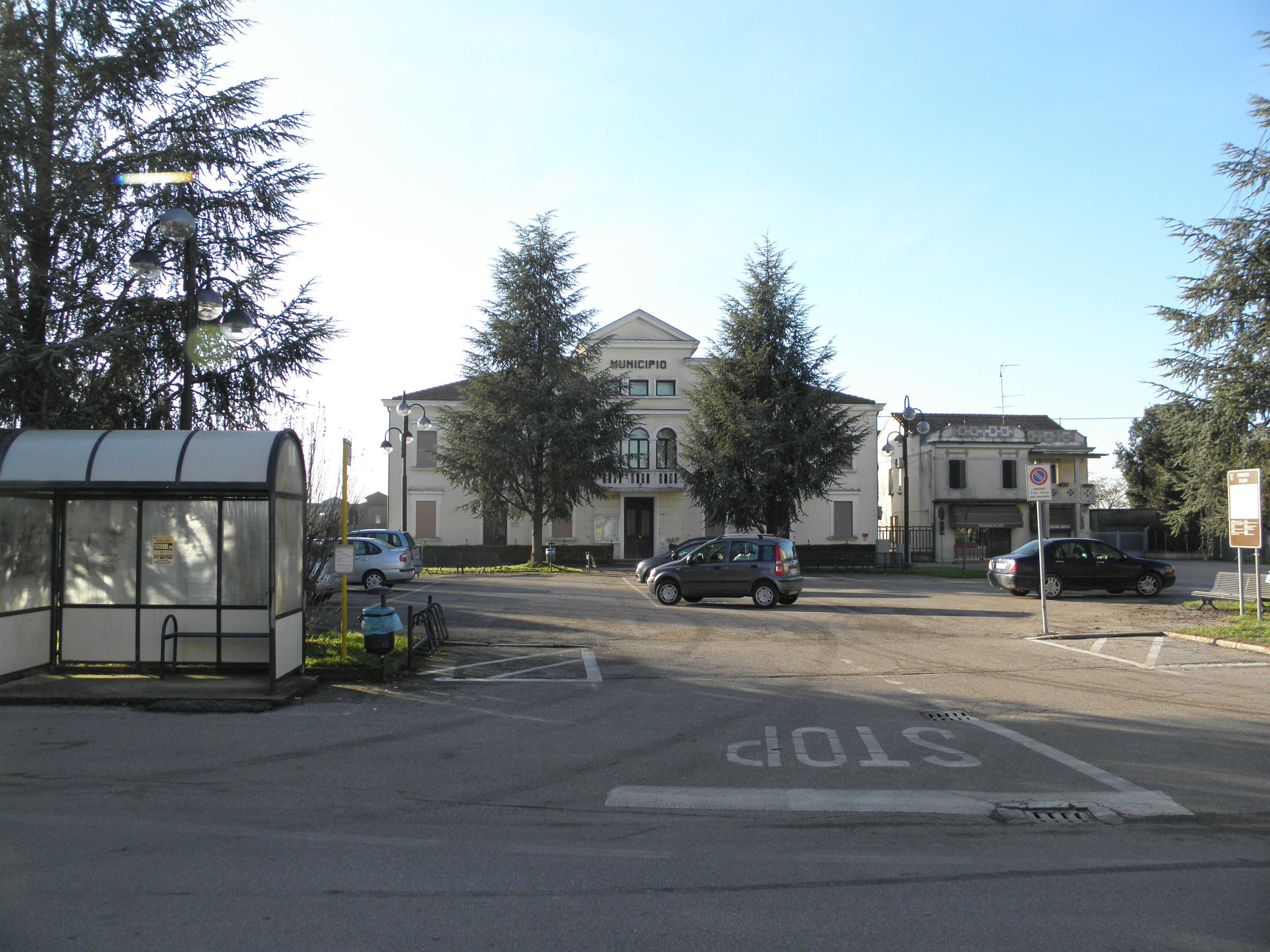 Salara, Piazza dei Martiri e sullo sfondo la palazzina municipale.